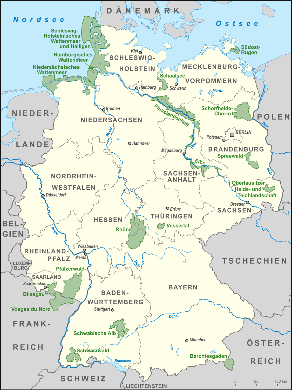 Karte der von der UNESCO anerkannten Biosphärenreservate in Deutschland, Stand 2017. Das bisher nur nach nationalem Recht bestehende Biosphärenreservat Karstlandschaft Südharz ist nicht enthalten.